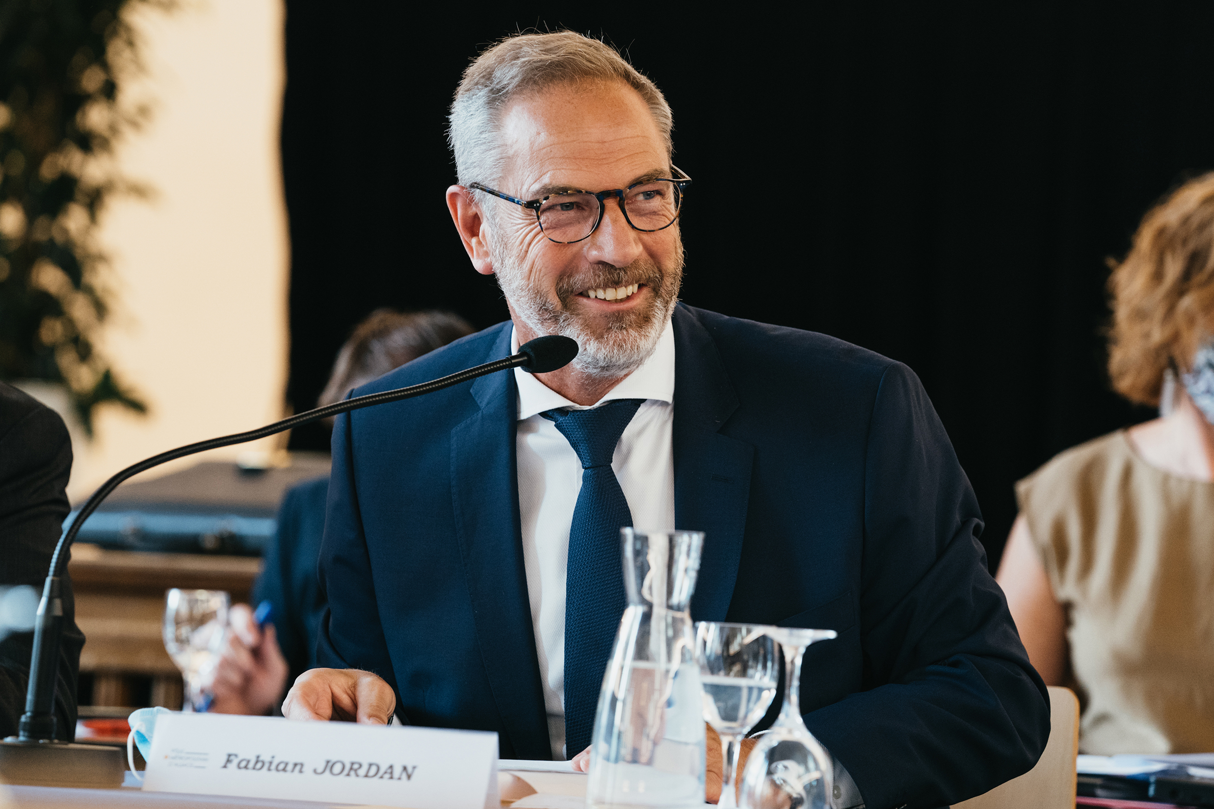 Photo Fabian Jordan